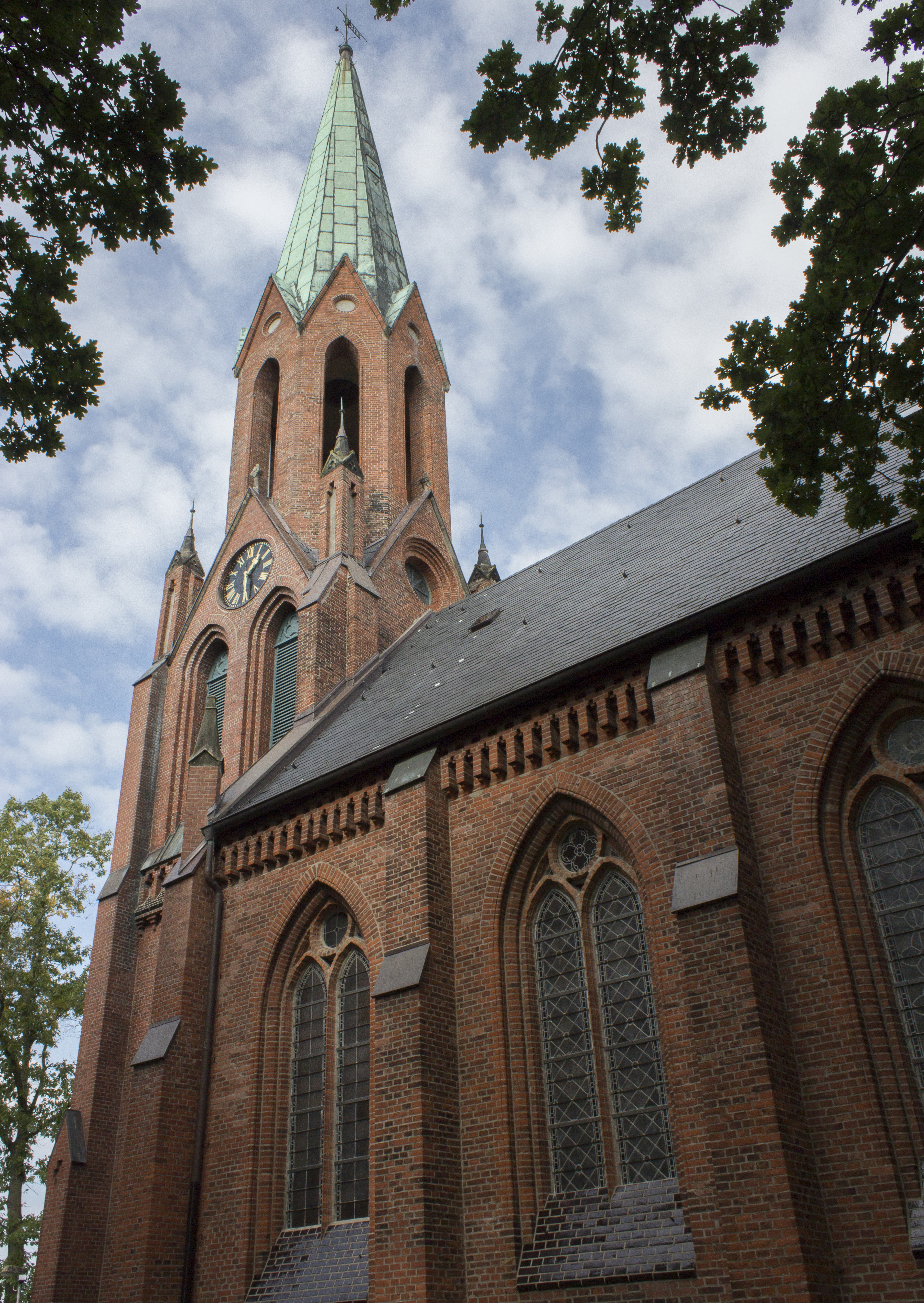 Zionkirche in Bremerhaven, Wurster Straße 404Das abgebildete Objekt ist ein geschütztes Kulturdenkmal in der Freien Hansestadt Bremen, mit der Nr. 3192 beim Landesamt für Denkmalpflege registriert. Zionkirche in Bremerhaven-Weddewarden